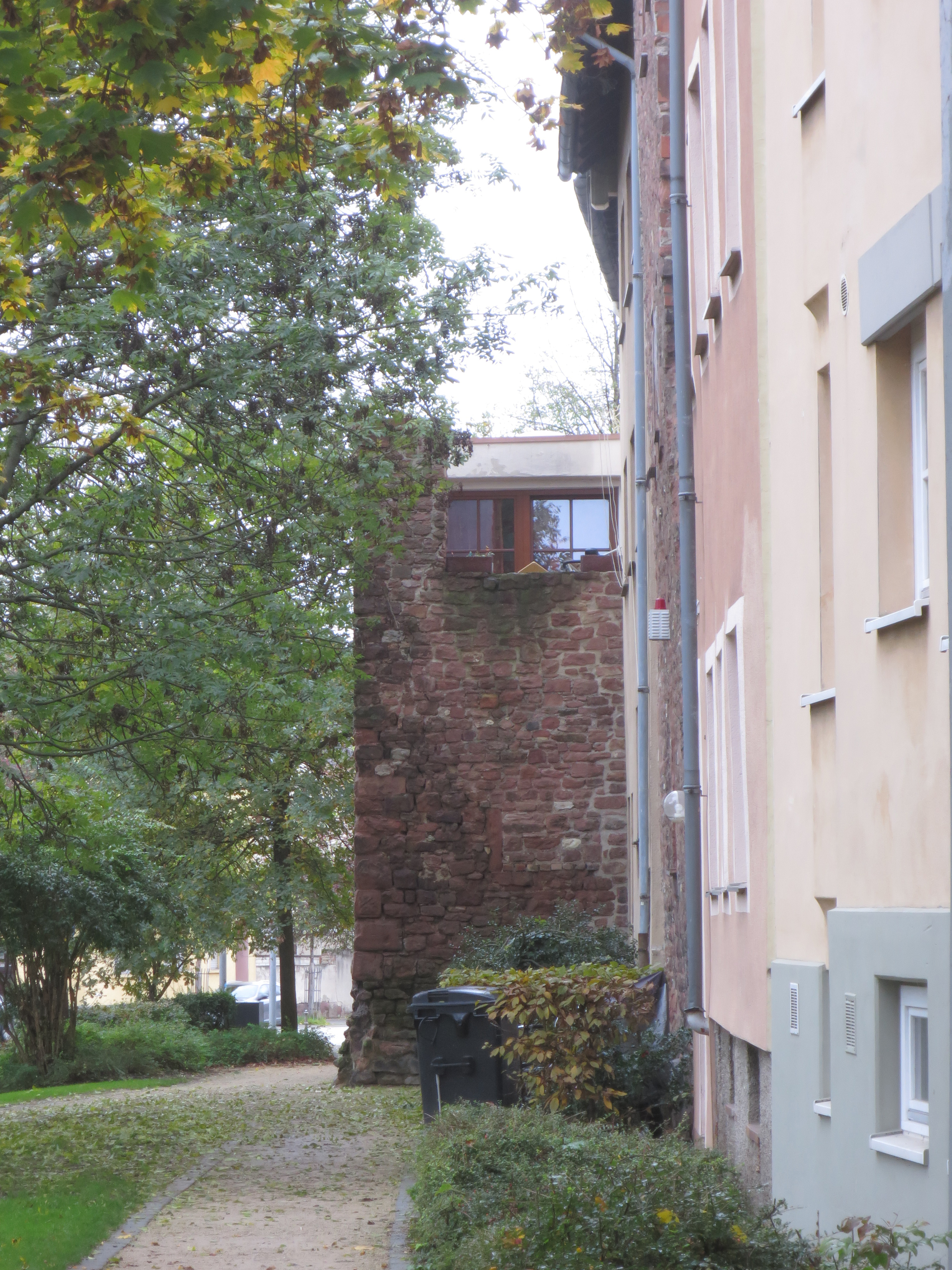 Ziegelturm der Stadtmauer Worms